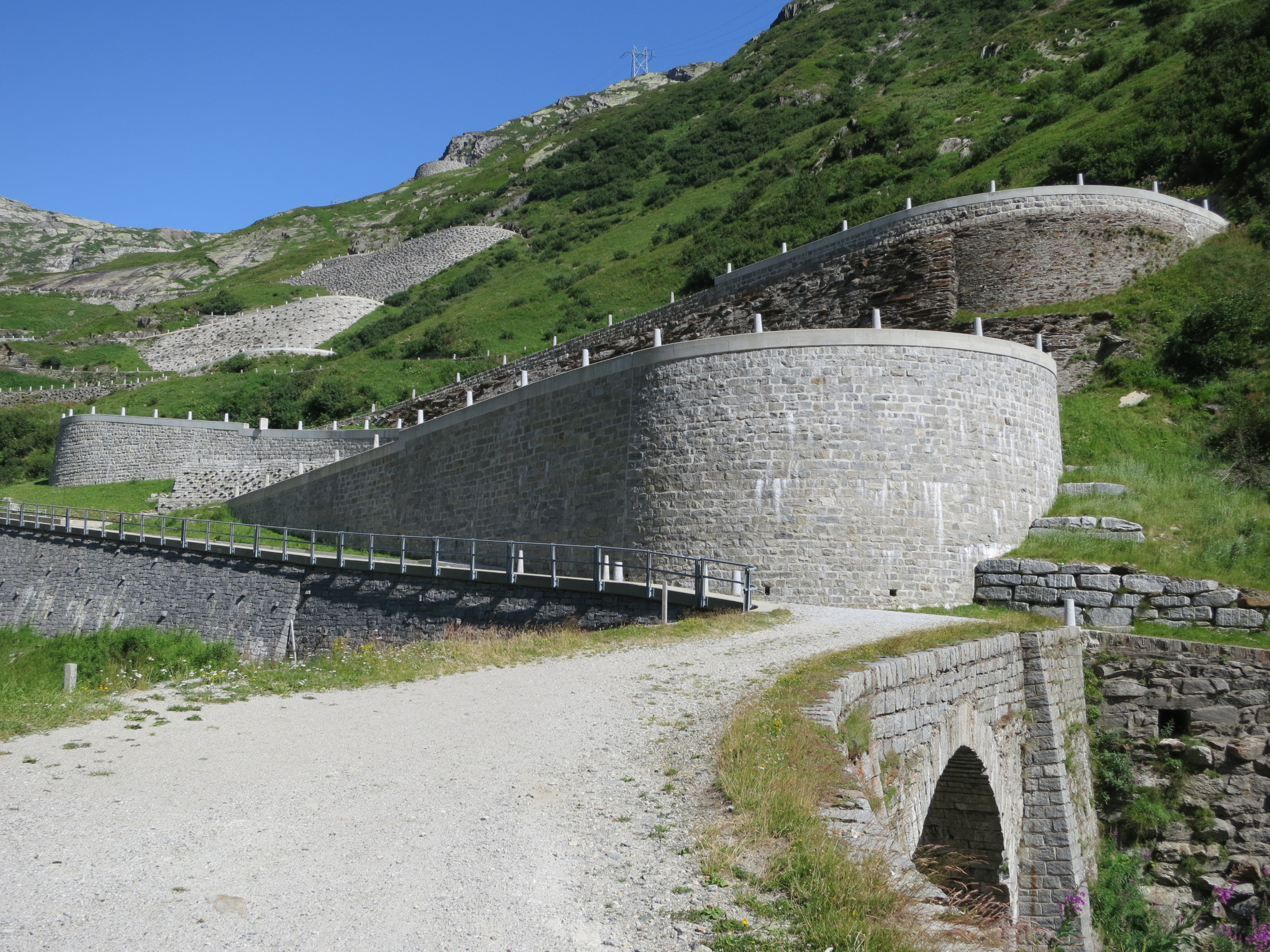 Tremola, Gotthardpass, Airolo TI, Schweiz